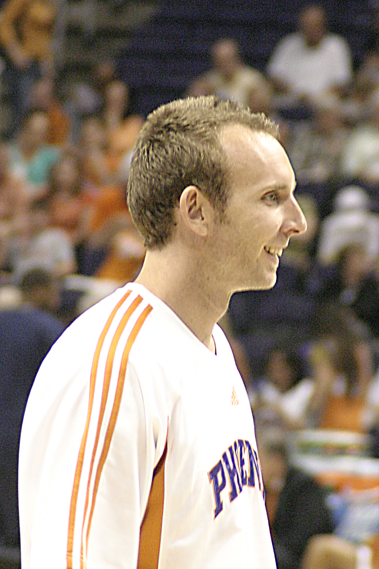 Sean marks